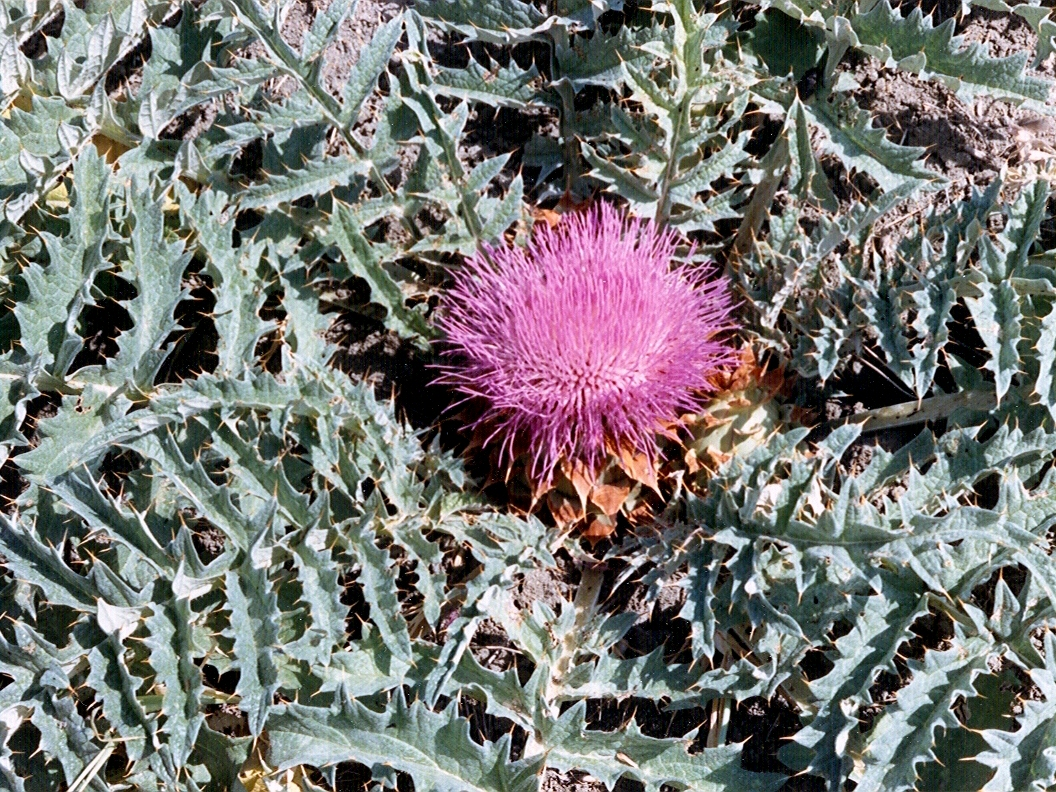 Cynara tournefortii (alcachofera, morra) - Vista general en flor - Colonia Llorente, La Abubilla, circa Coslada (Madrid, España).